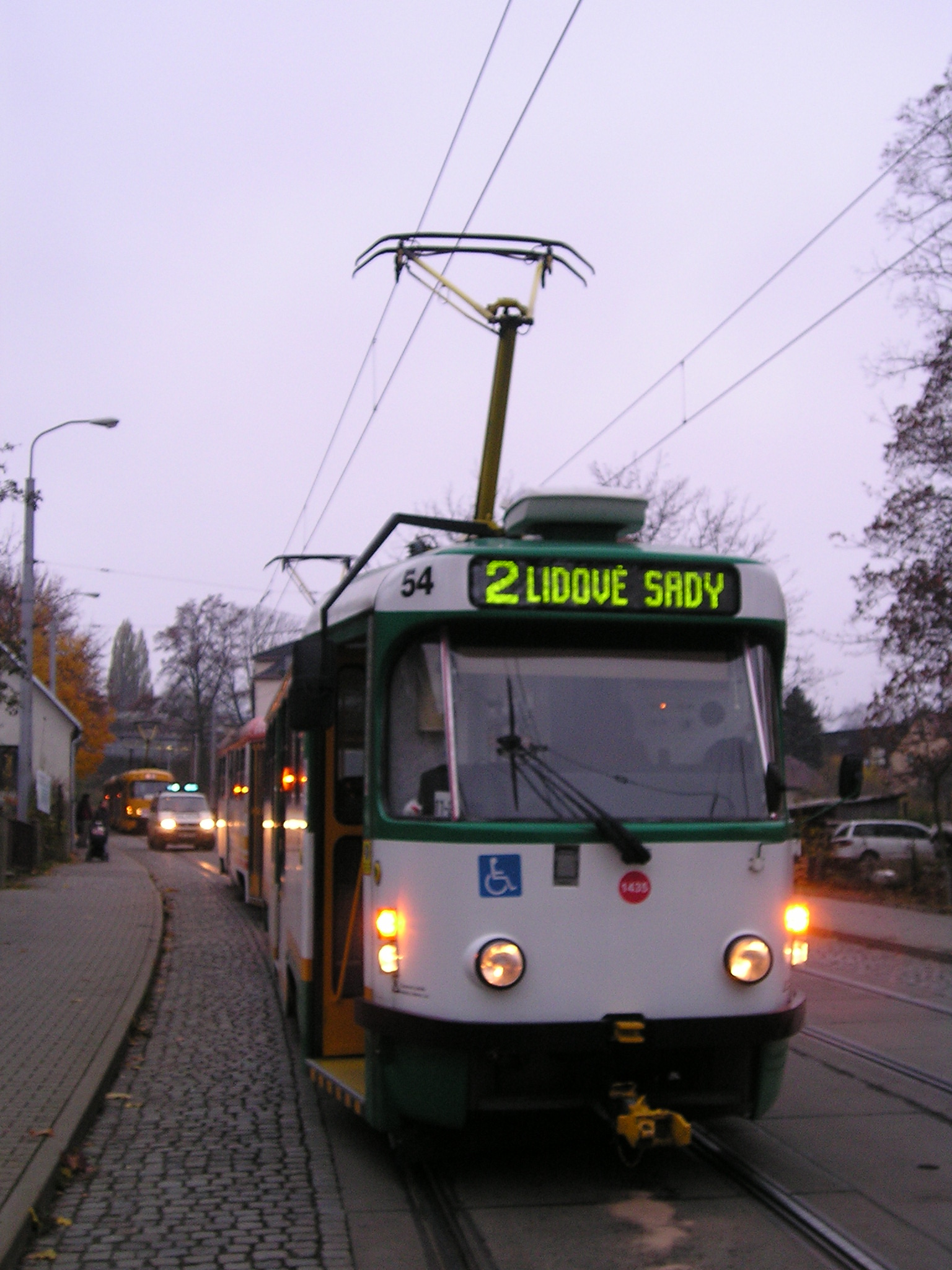 Tramvaj v ulici Ještědská